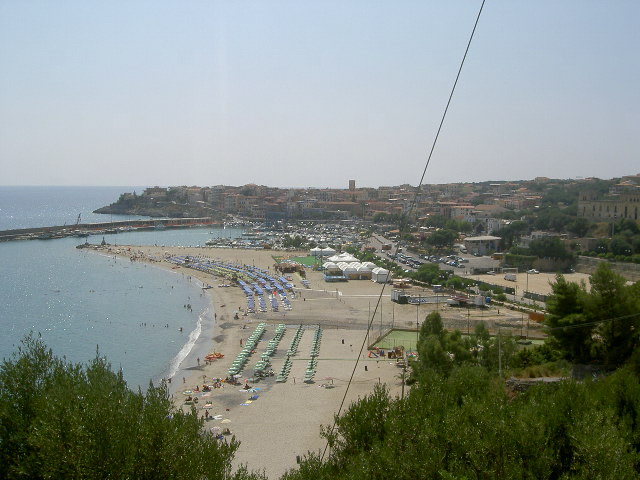 Marina di Camerota seen from an hill